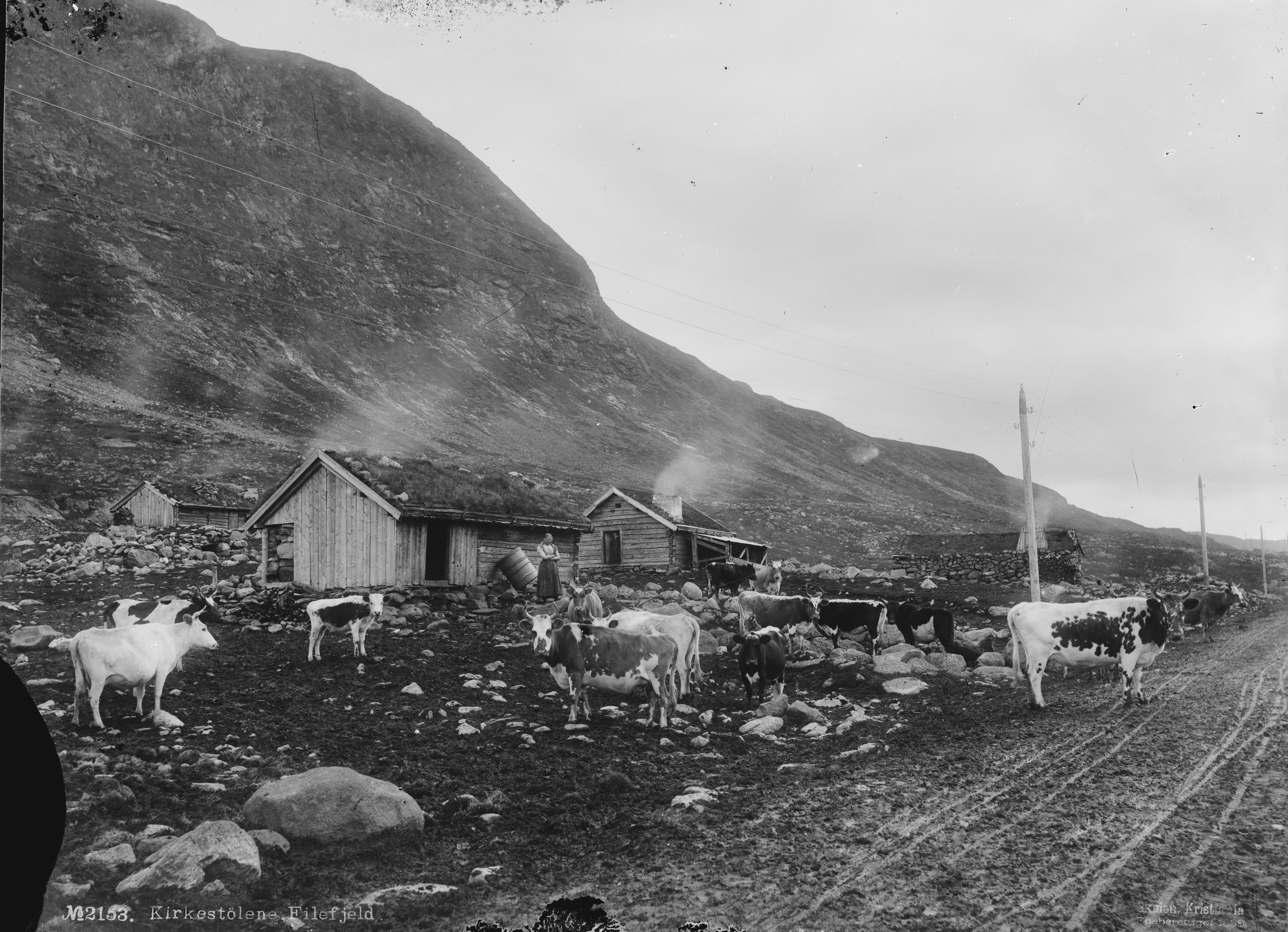 Påskrift negativ: No2153. Kirkestølene, Filefjeld. Skøien, Kristiania Eneberettiget 1898 Påskrift negativ: 149 Vang. Kirkestølene [Riksantikvaren] Påskrift konvolutt: B-149 Vang. Kirkestølene [Riksantikvaren] [Negativet er eksponert med speilvendt resultat. Rettet opp.] Sted: Filefjell,Kirkestølene Kommune: Vang Fylke: Oppland Tagger: fjellandskap seter kuer seterjenter